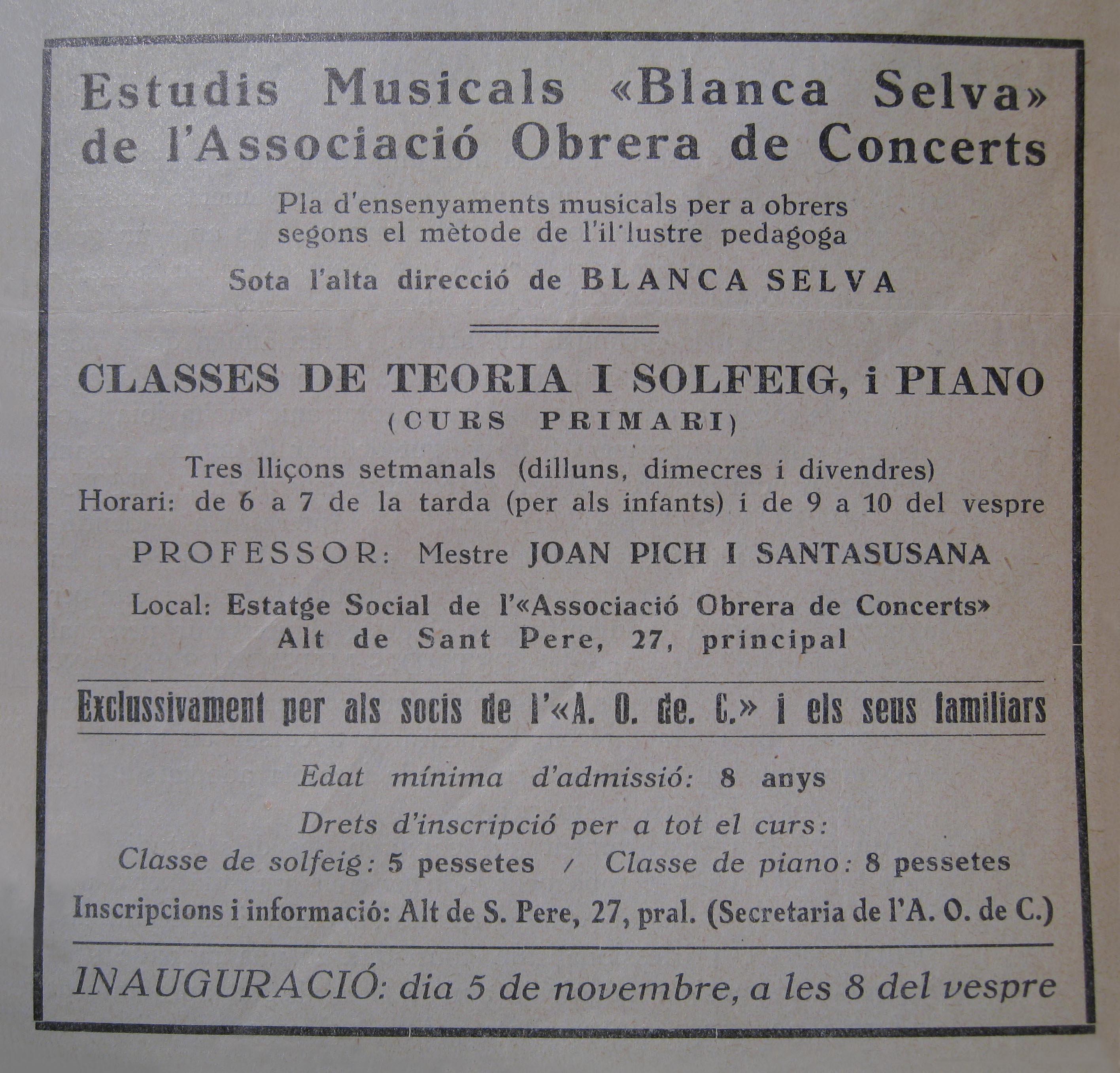 Fotografia d'un anunci dels Estudis Musicals Blanca Selva publicat al Noticiari de l'Associació Obrera de Concerts corresponent a l'octubre de 1934